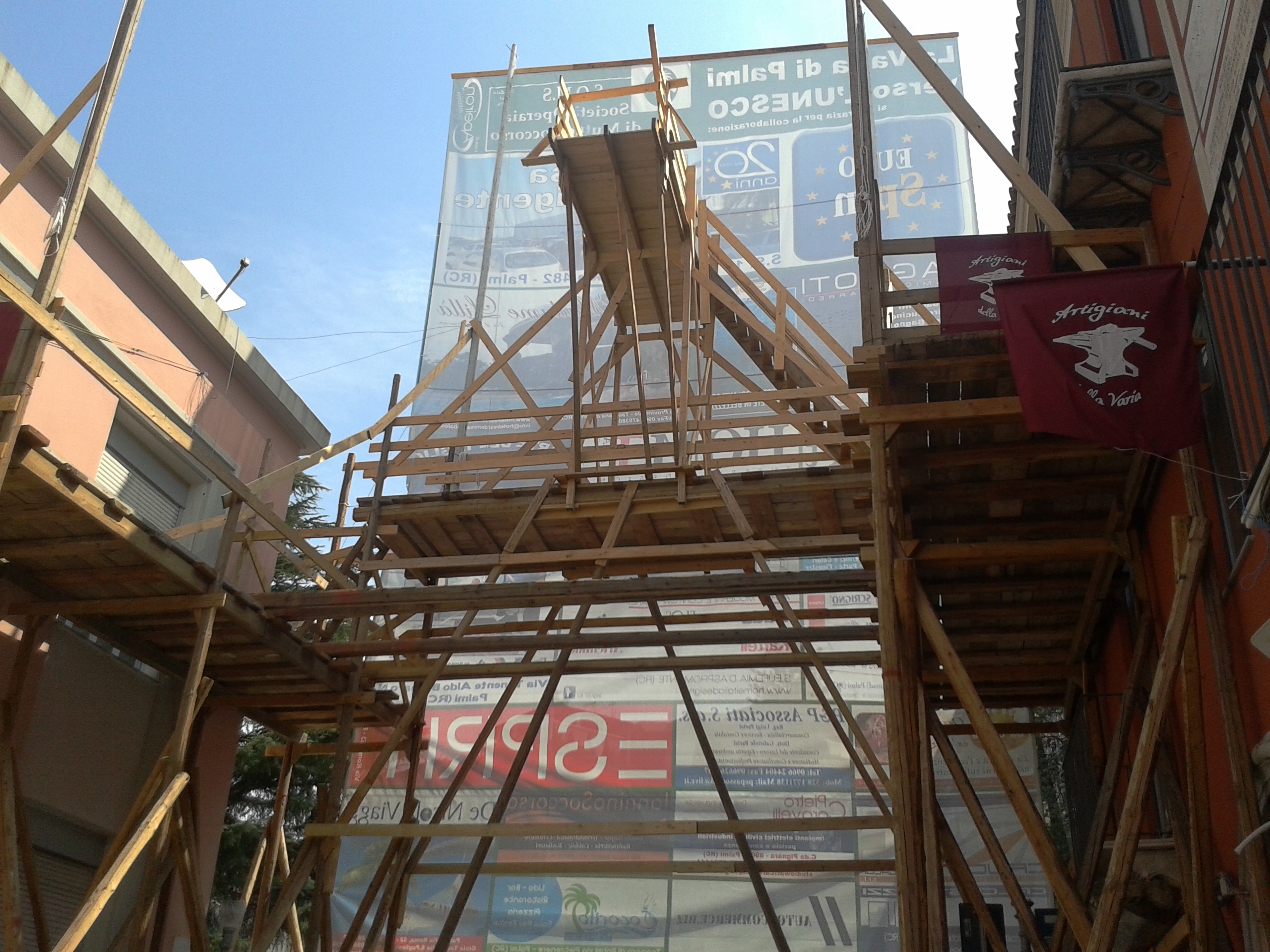 Ponteggio Varia di Palmi 2013